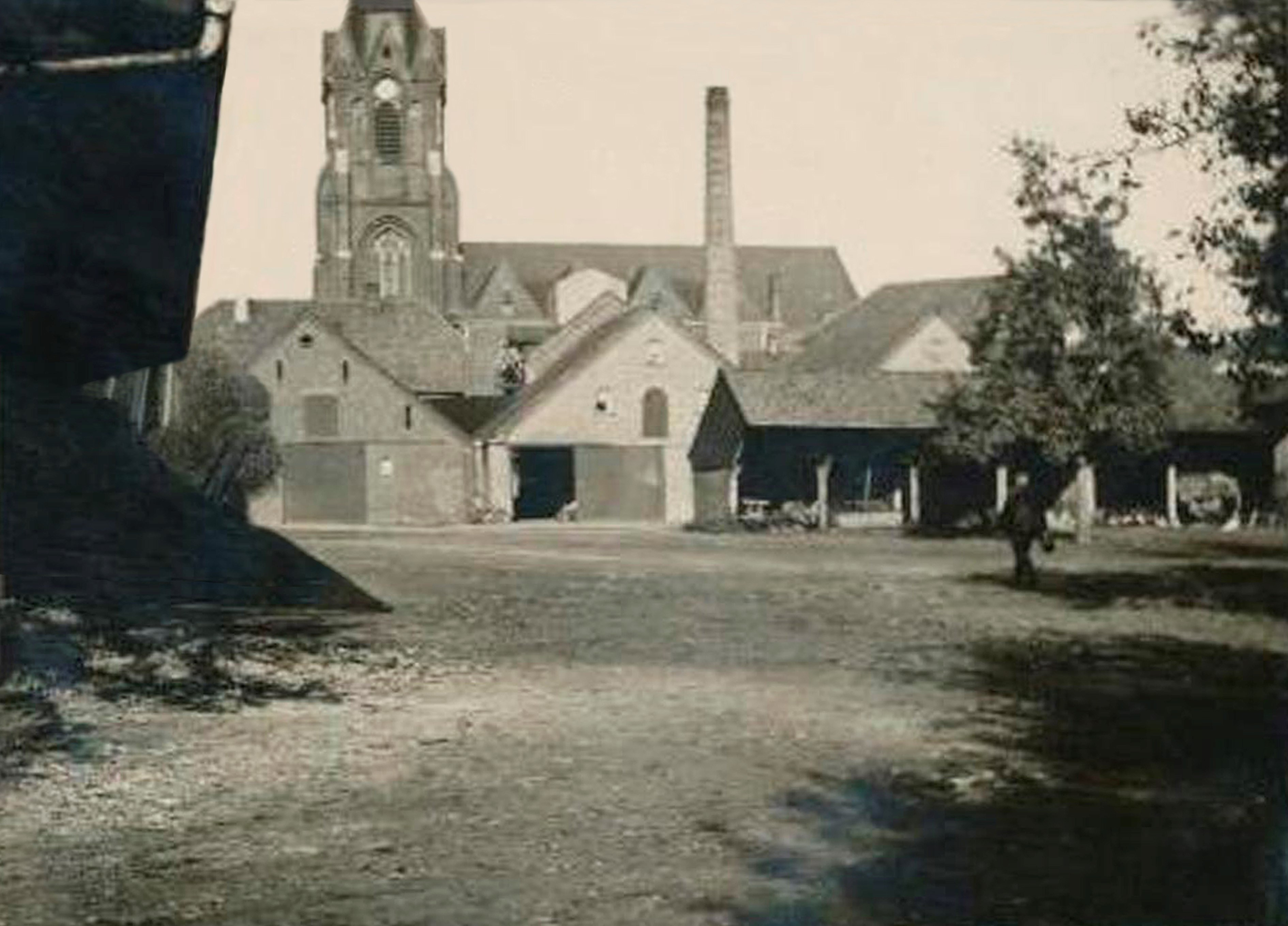 St. Silvester zu Erle, Kirchengebäude vor der Zerstörung am 23.04.1945. Der Fotograf steht auf dem Hof Böckenhoff, vor der Kirche ist die Brennerei Böckenhoff zu sehen. Davor die Schermbecker Straße.